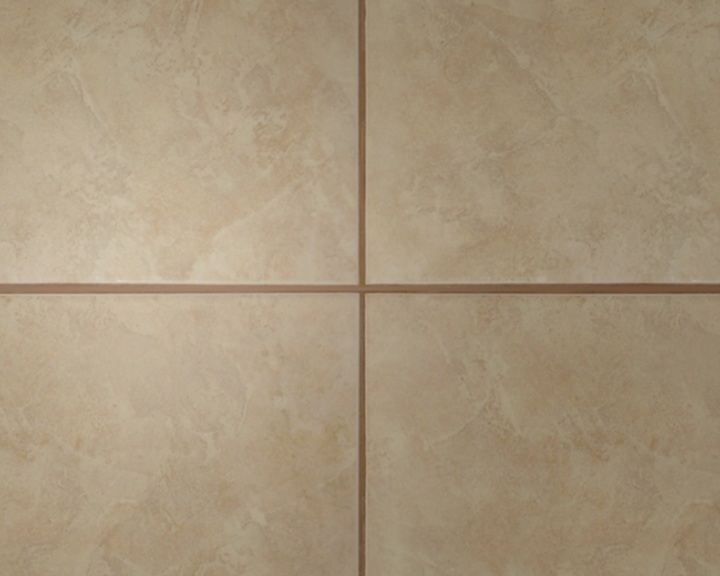 Dlažba bez použití bump mapy